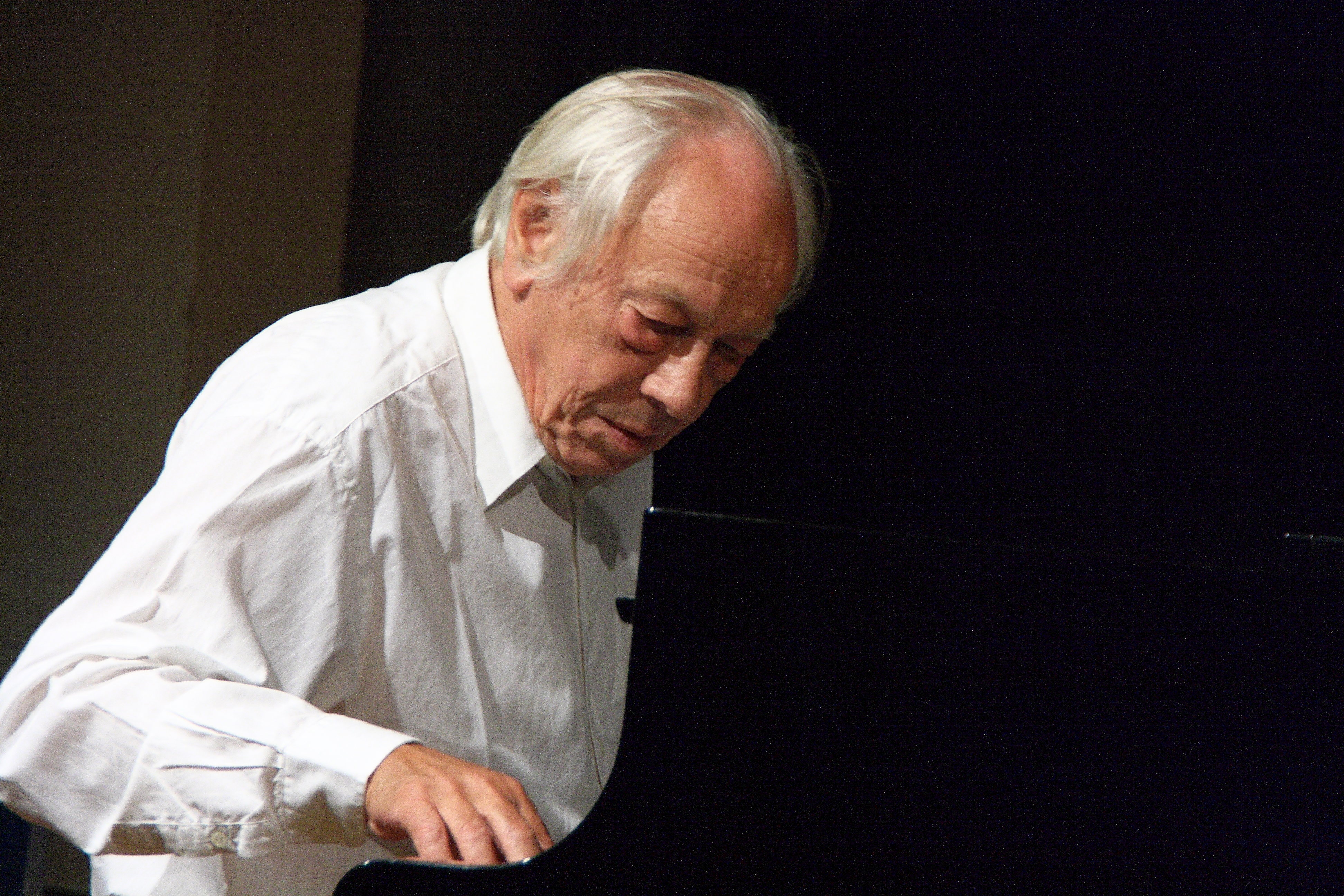 Der belgische Pianist Fred van Hove im NOWJazz-Konzert des SWR 2, Club W71 und Stadt Niederstetten mit der Gruppe QUAT im KULT, Niederstetten 2013.